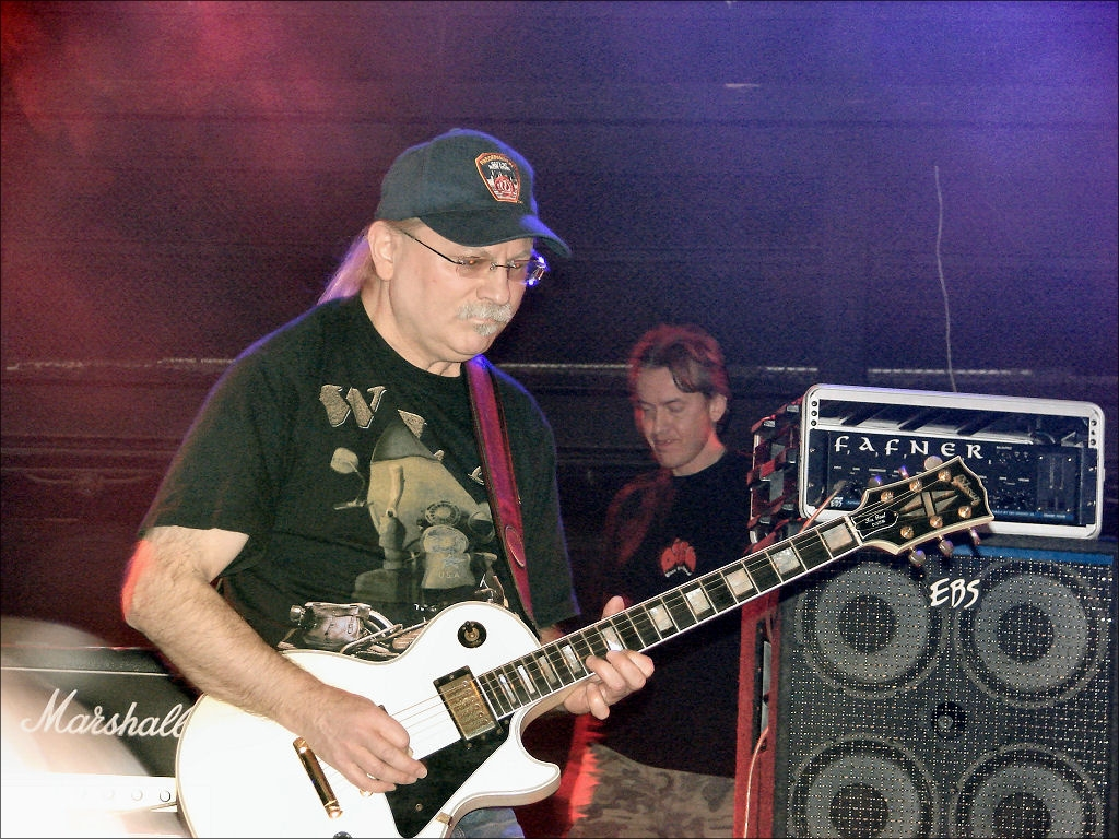 Adam Otręba